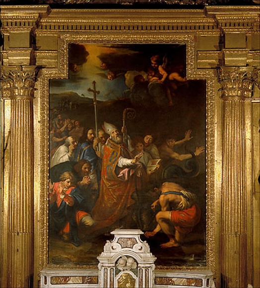 Tableau de Nicolas Mignard représentant saint Véran enchaînant le dragon dans la chapelle de Saint Véran de la cathédrale Saint Véran de Cavaillon (Vaucluse).